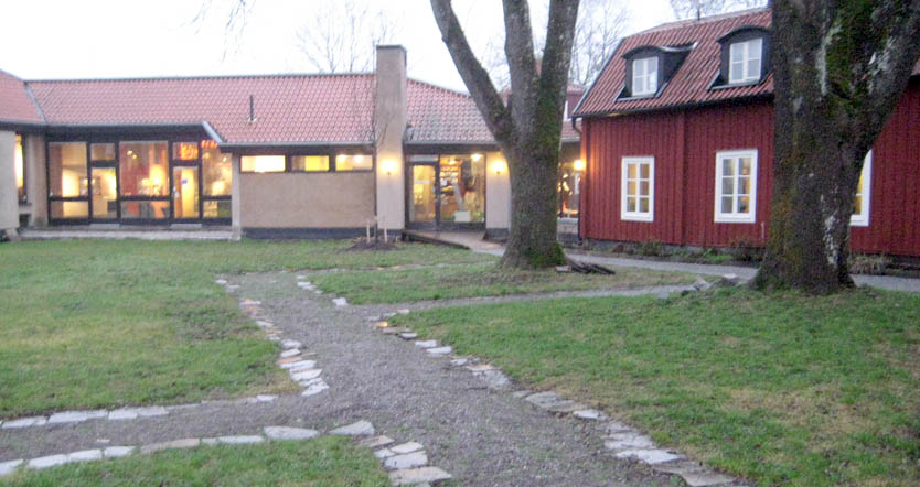 Sigtuna Museum, Sverige/Swede/Suède